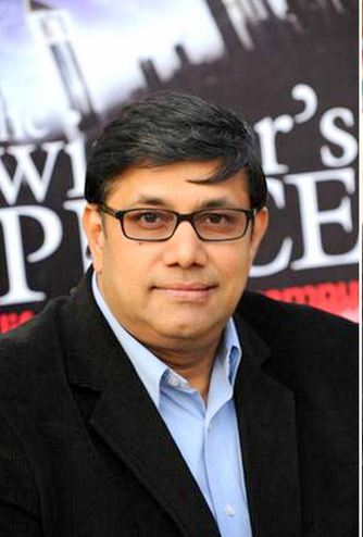 S V Divvaakar Picture